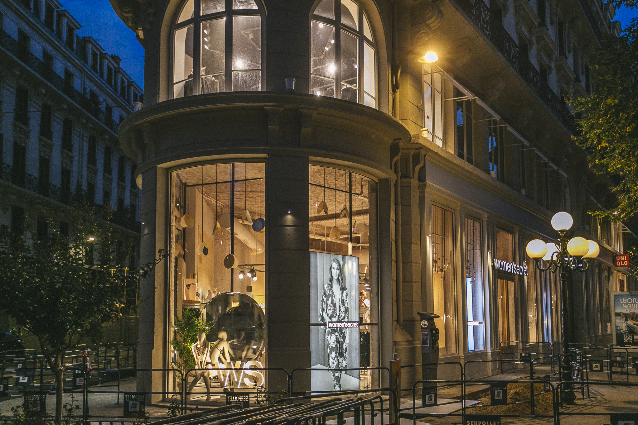 Women'secret Tienda Lyon Fachada